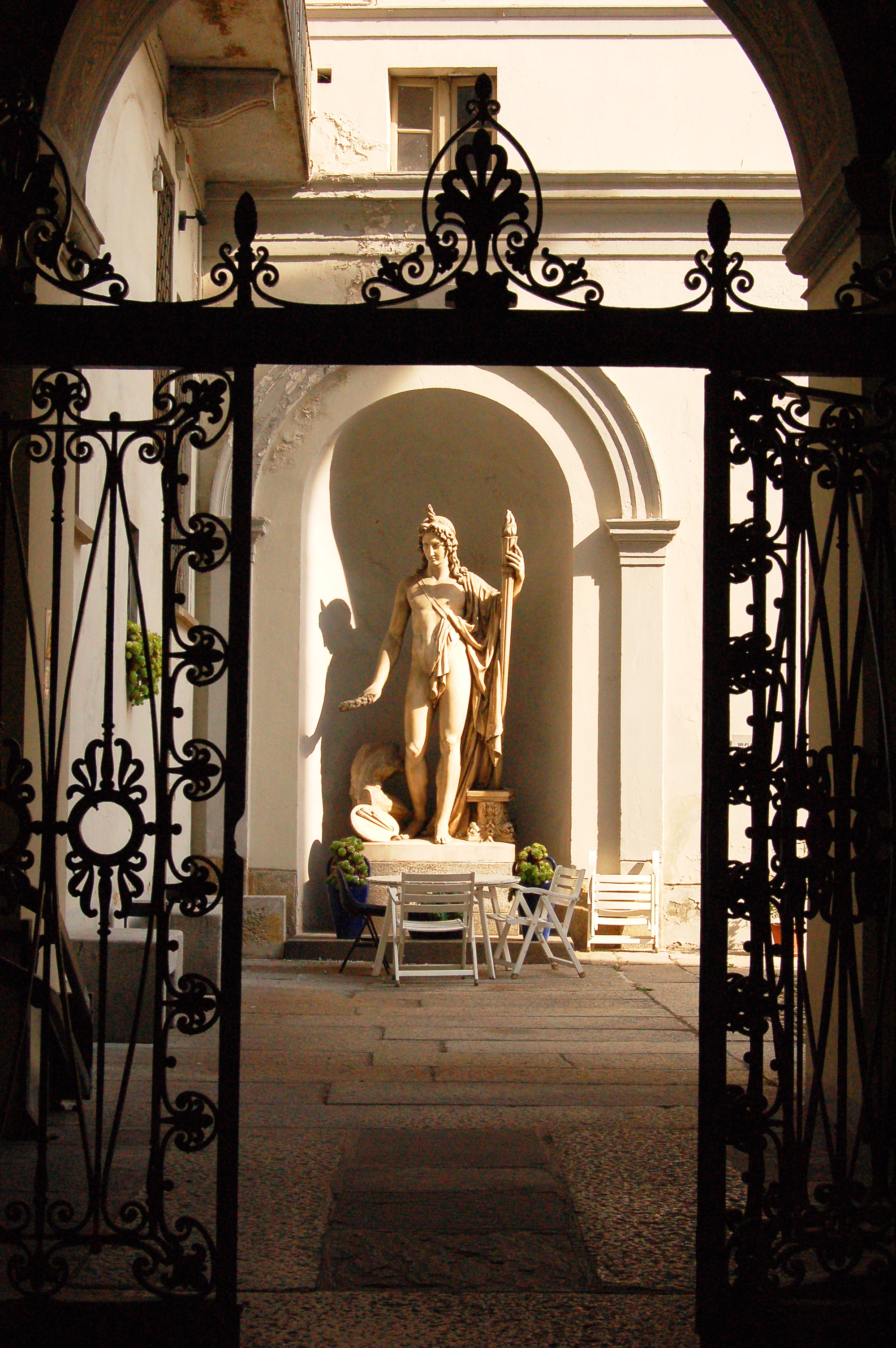 statua dentro il cortile della biblioteca